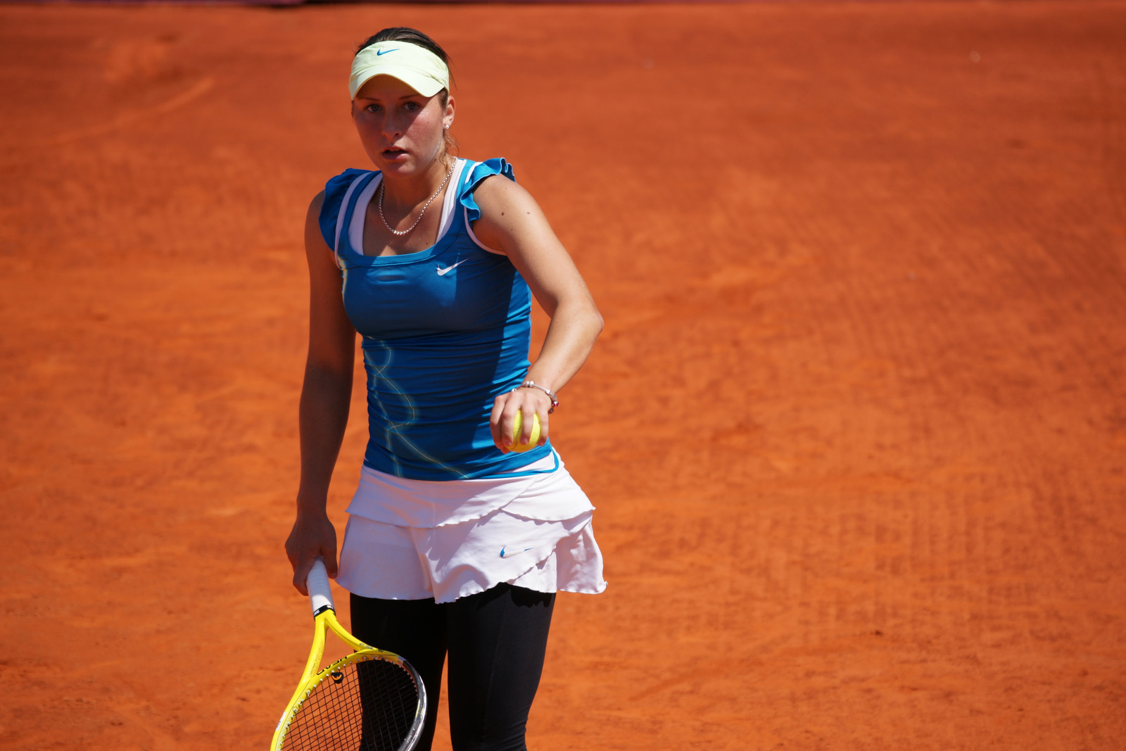 Gail Brodsky, Open tennis, Cagnes-sur-Mer, 2011